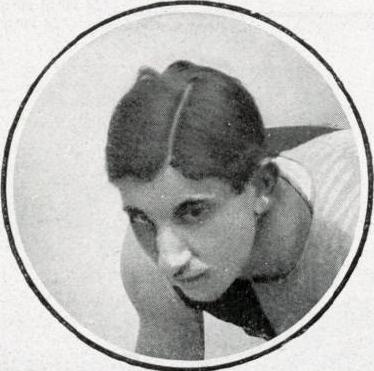 Edouard Taylor, stayer recordman mondial de l'heure en 1898, puis 1900.